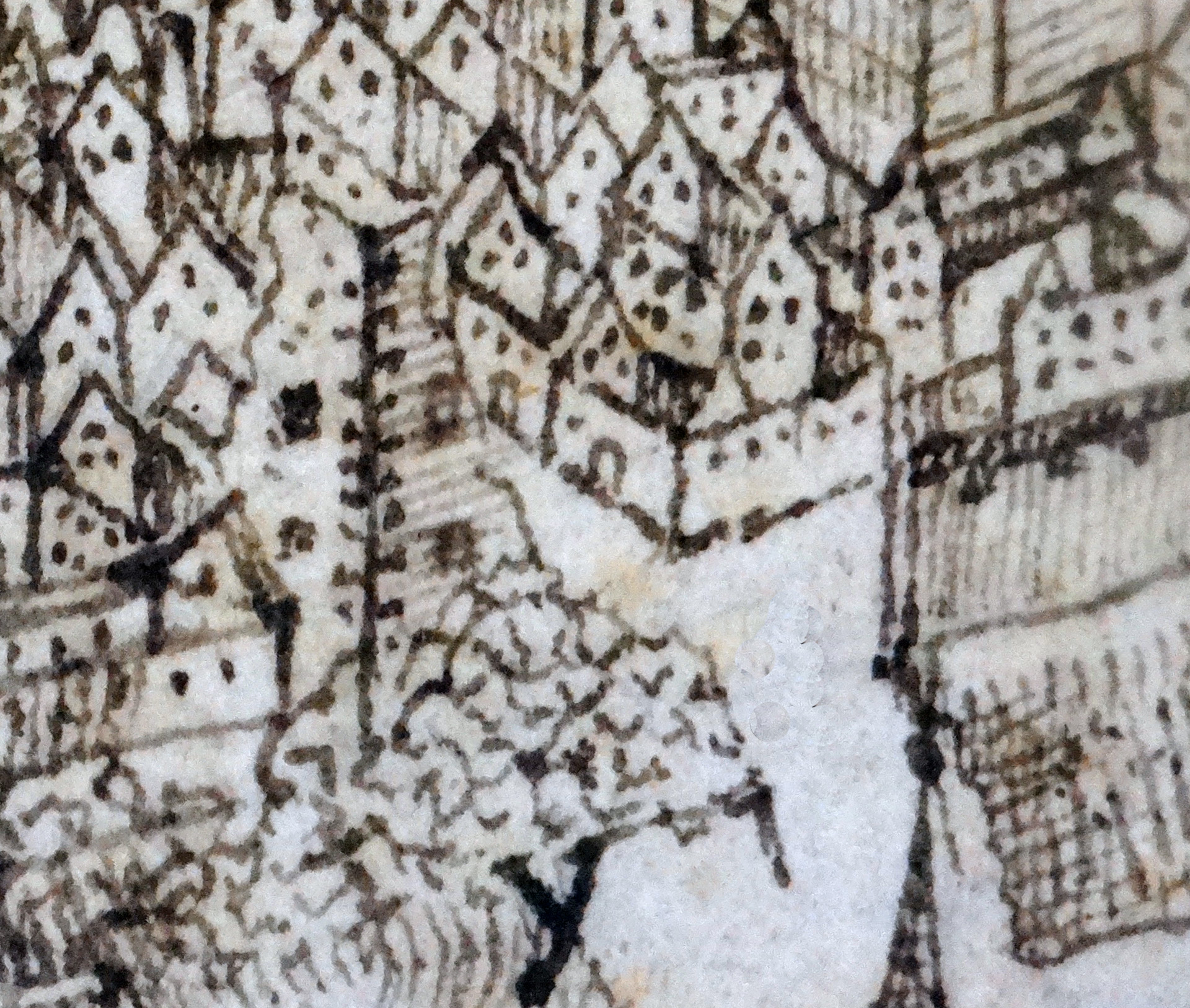 Andreastor, Worms, nach der Zerstörung von 1689. Detail aus: Peter Hamman: Ansicht der Stadt Worms nach der Zerstörung 1689 von Norden. Stadtarchiv Worms, Abt. 1B, Nr. 48.